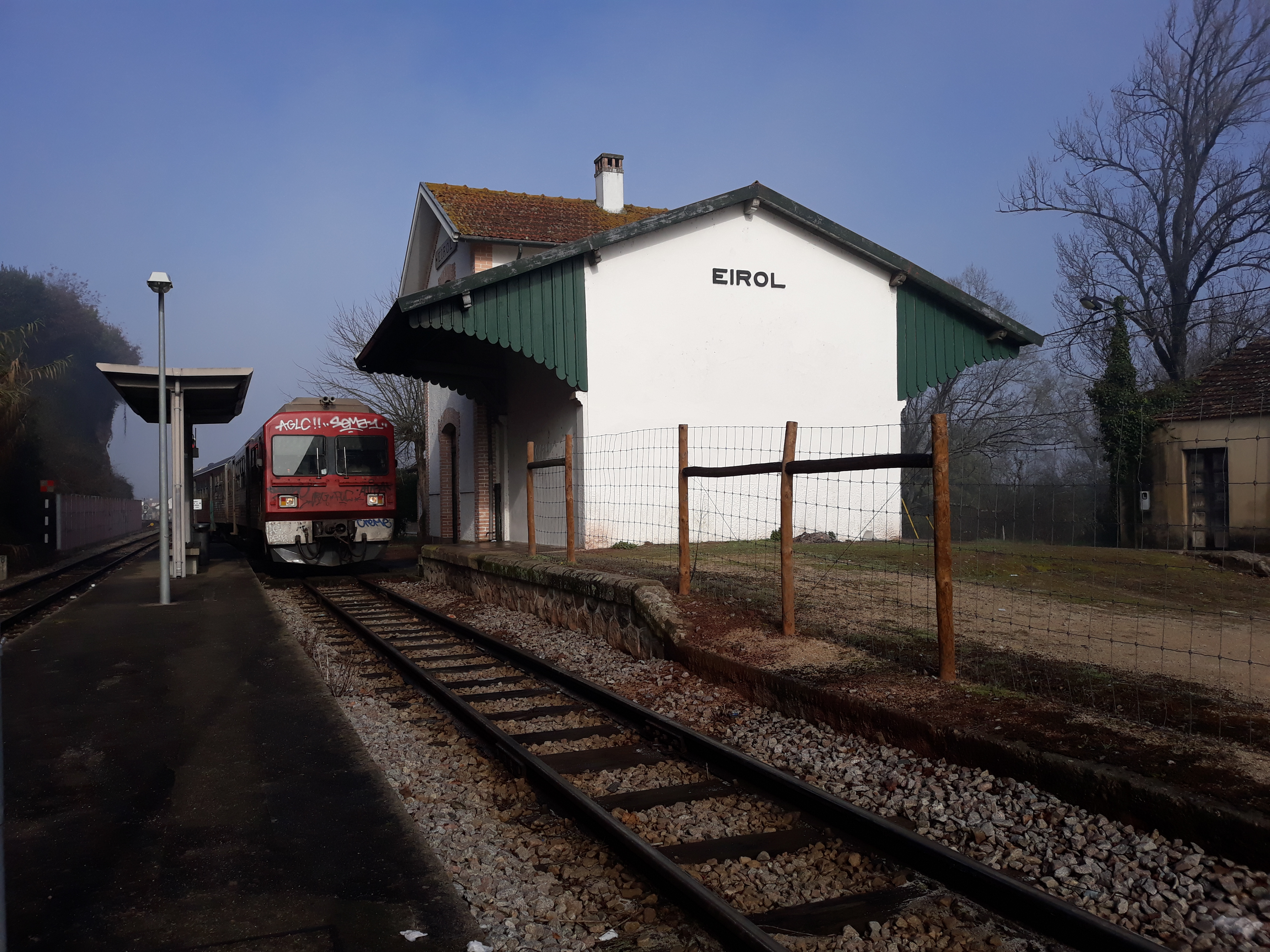 Estação dos caminhos de ferro - Eirol